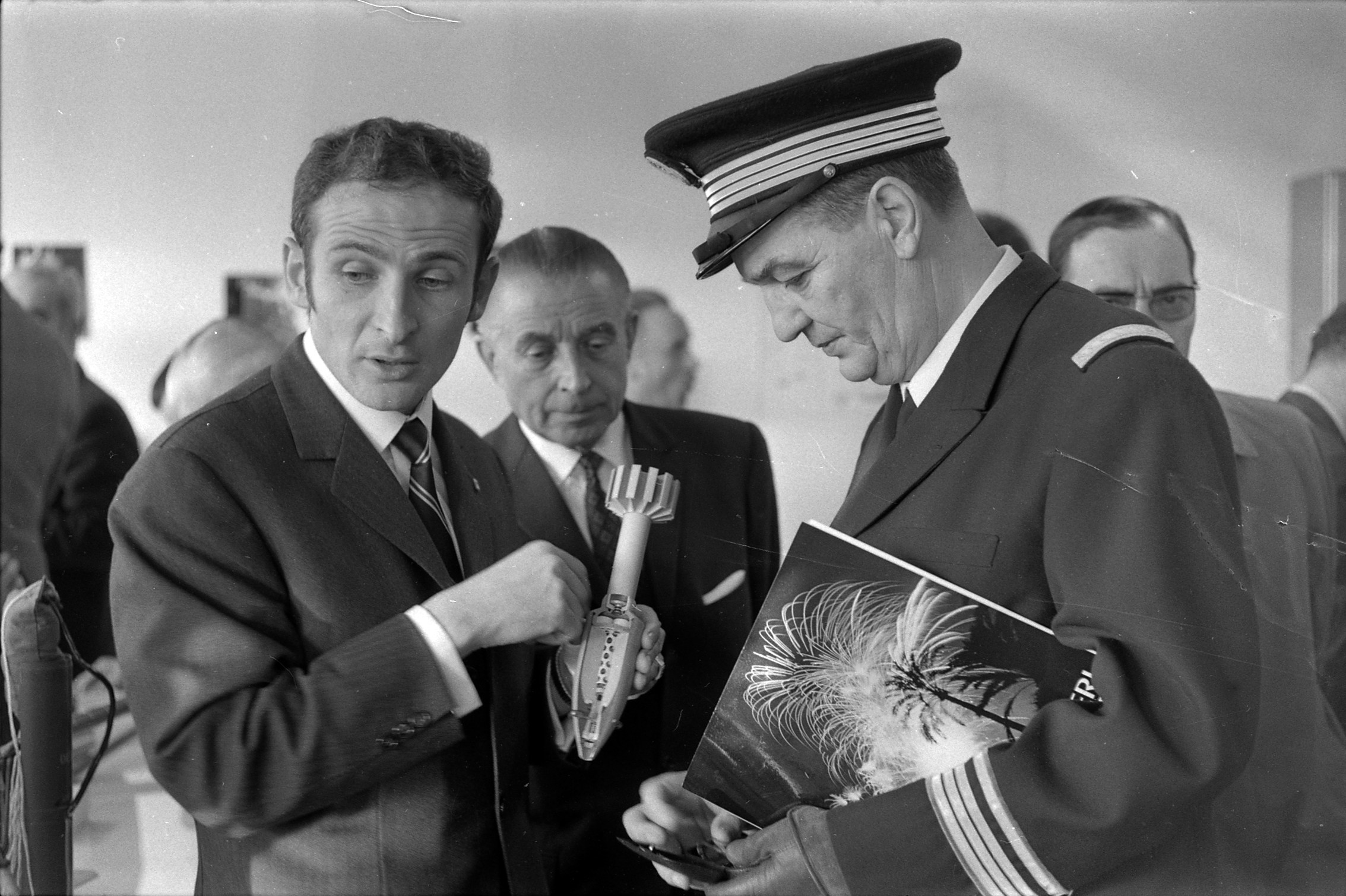 Route de Revel. Le 22 Janvier 1969. Dans les établissements Rugiéri à Toulouse, présentation de la grenade à fusil fumigène de 50 mm Modèle 1954 F4 Ruggieri.